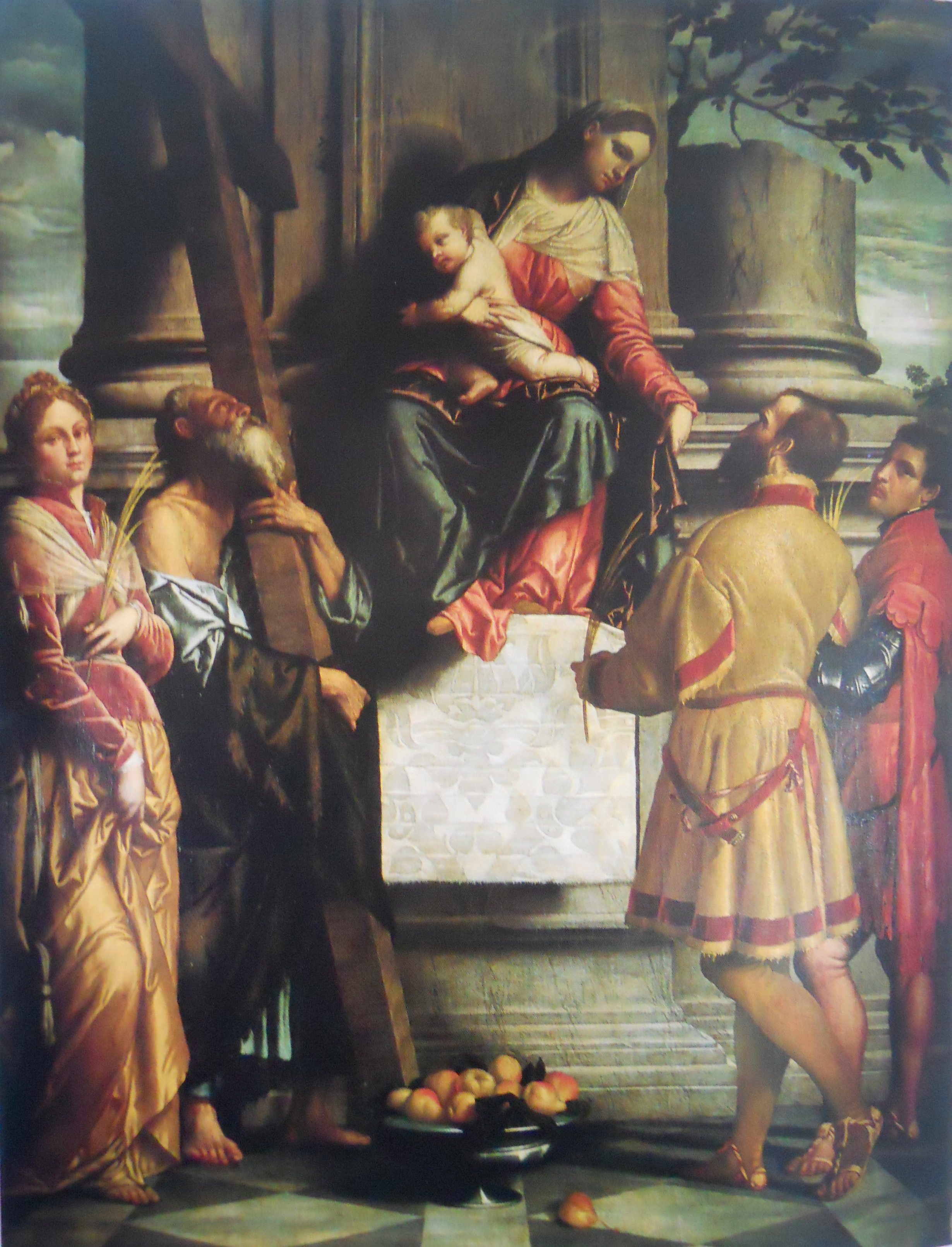 Madonna in trono tra i santi Andrea, Eusebia, Domno e Domneone (Moretto)